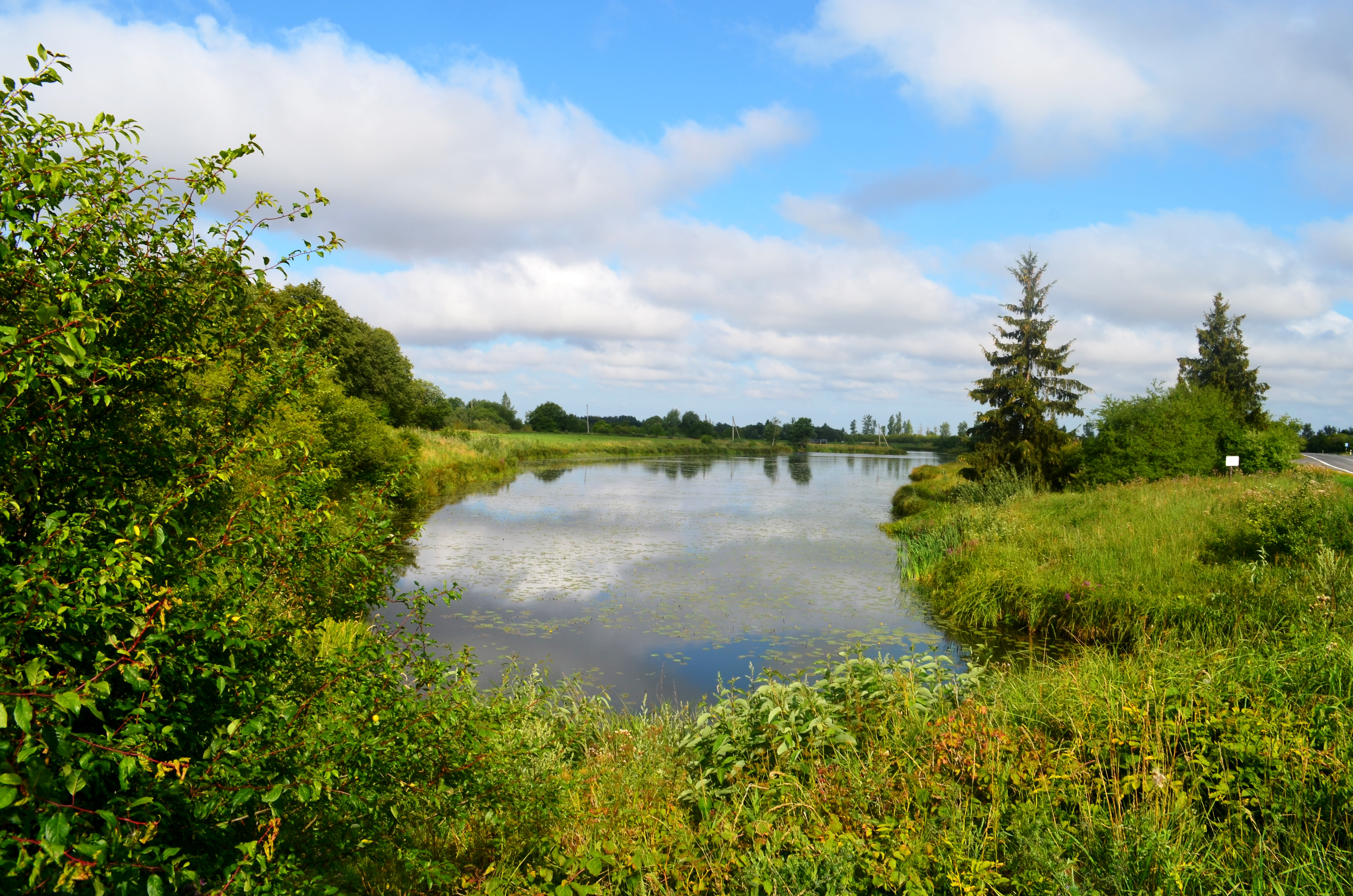 Kuigalių tvenkinys, Jonavos raj.